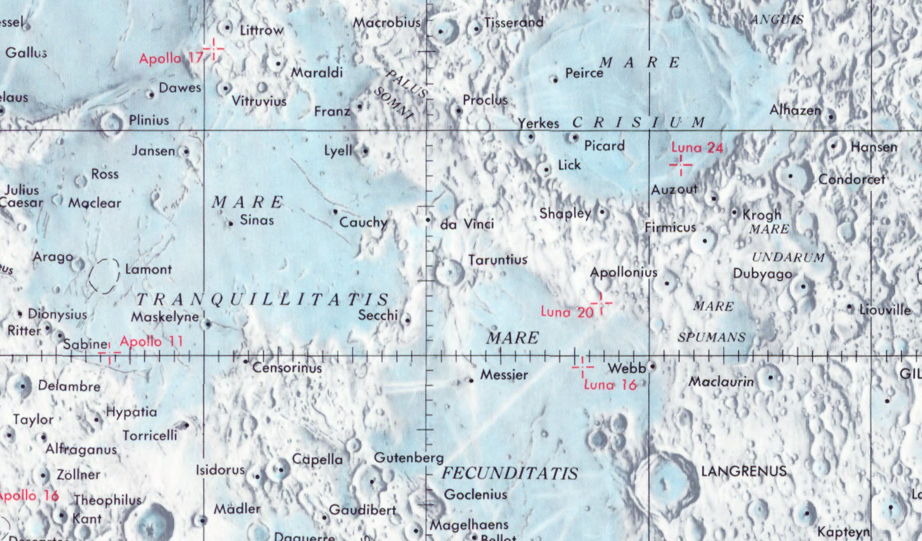 Cráter lunar Taruntius. Localización. (Lunar Chart LPC1. Second Edition)